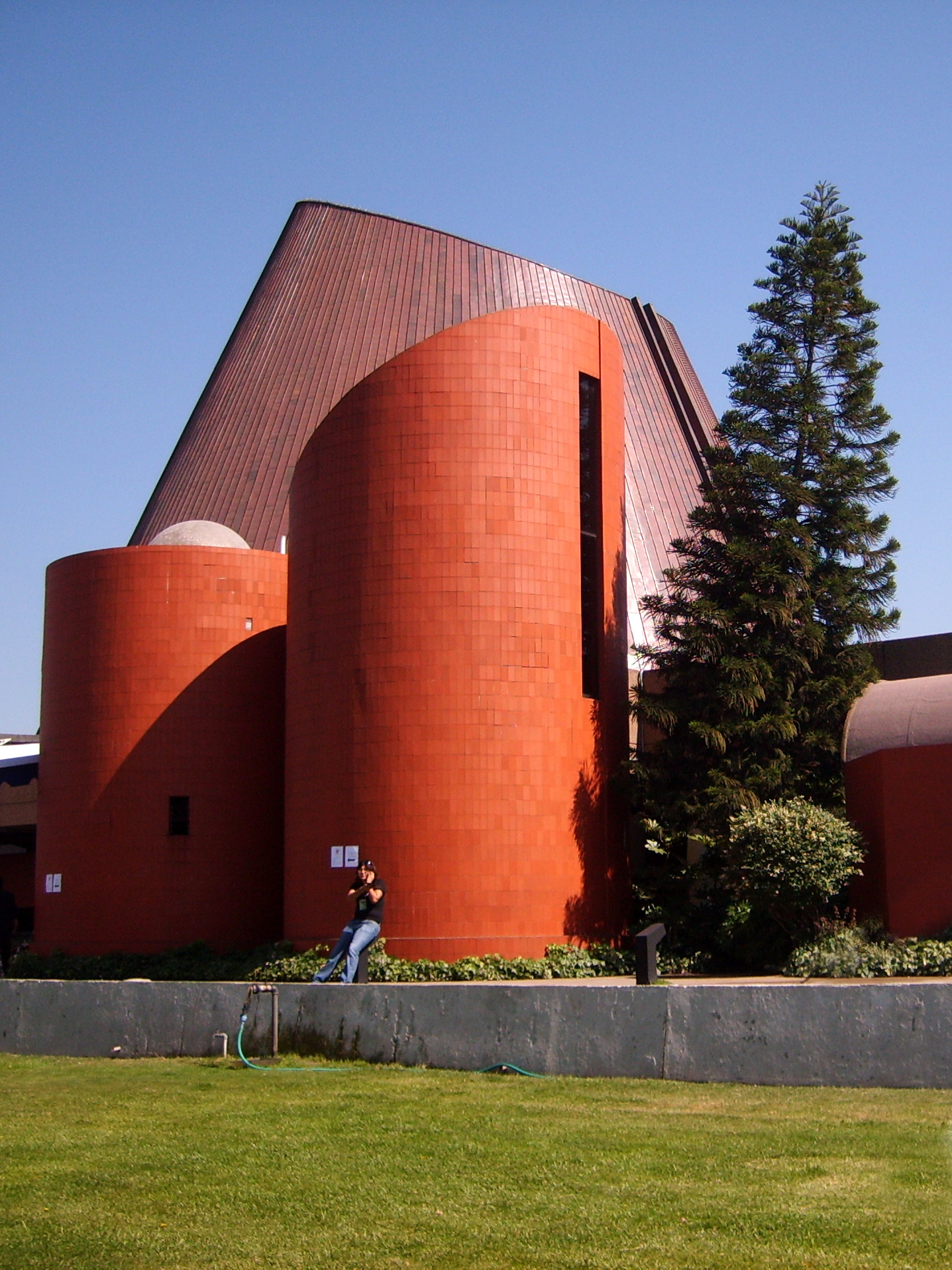 El Planetario de la Universidad de Santiago de Chile (USACH). 22 de noviembre de 2008.